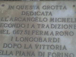 Primo piano dell'iscrizione apposta nel 1981 a ricordo della vittoria Longobarda a Forino.